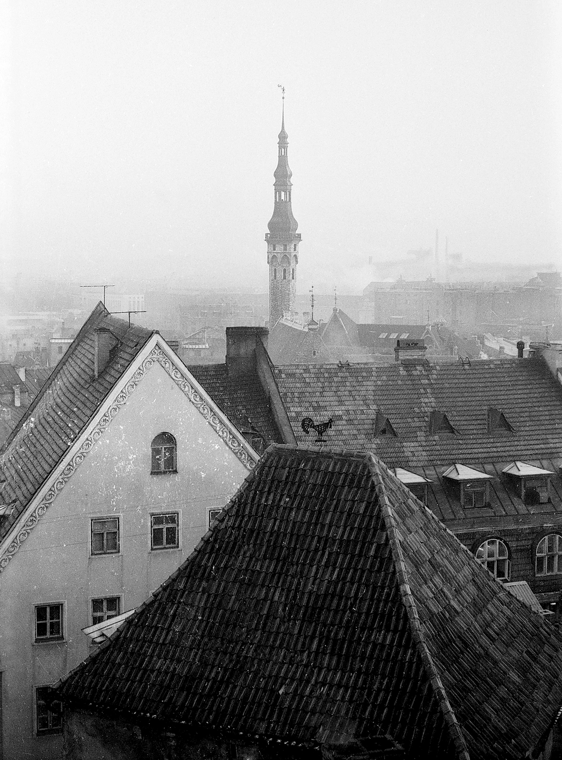 Tallinna raekoda 71